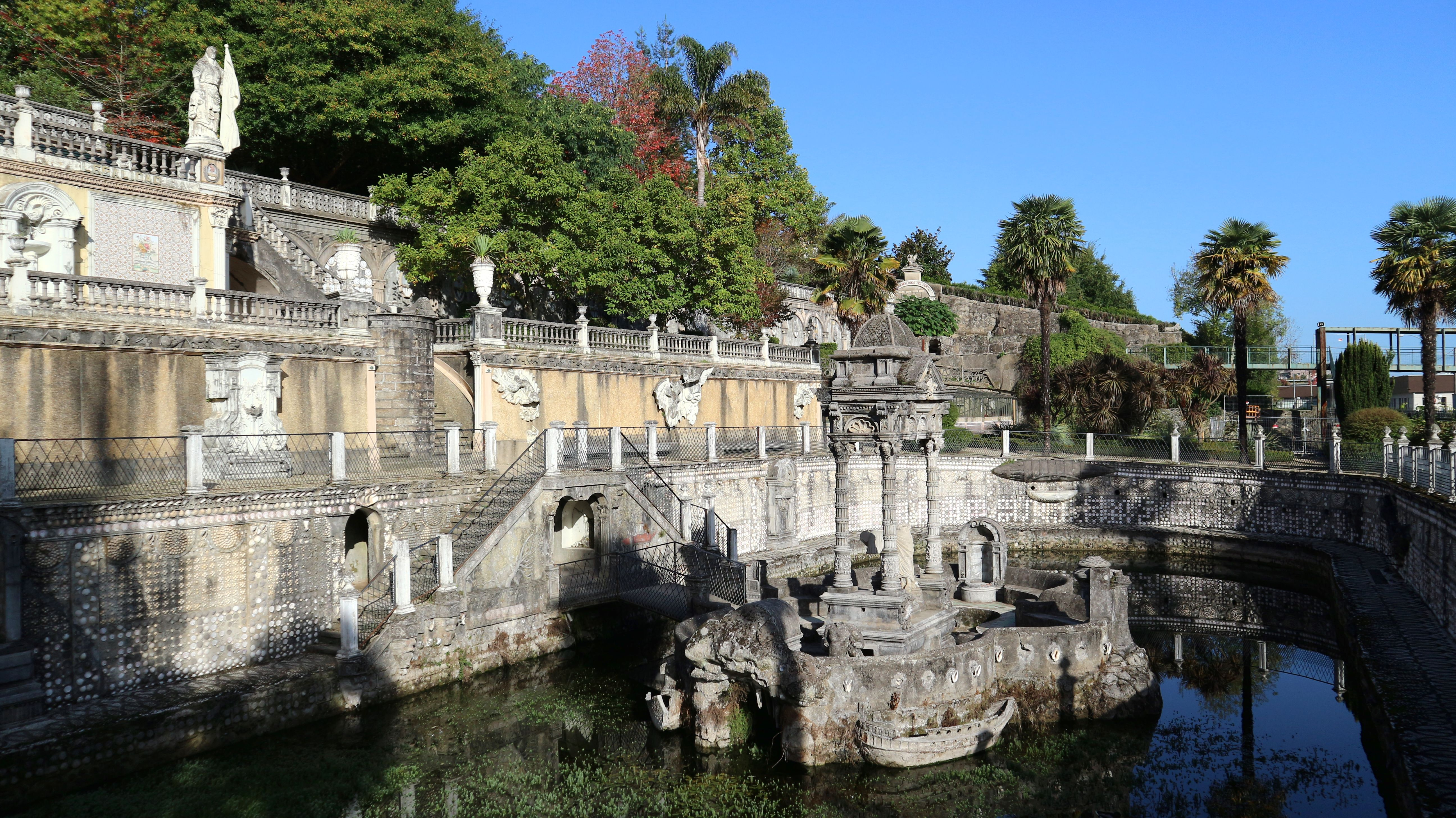 Parque do Pasatempo, Betanzos.